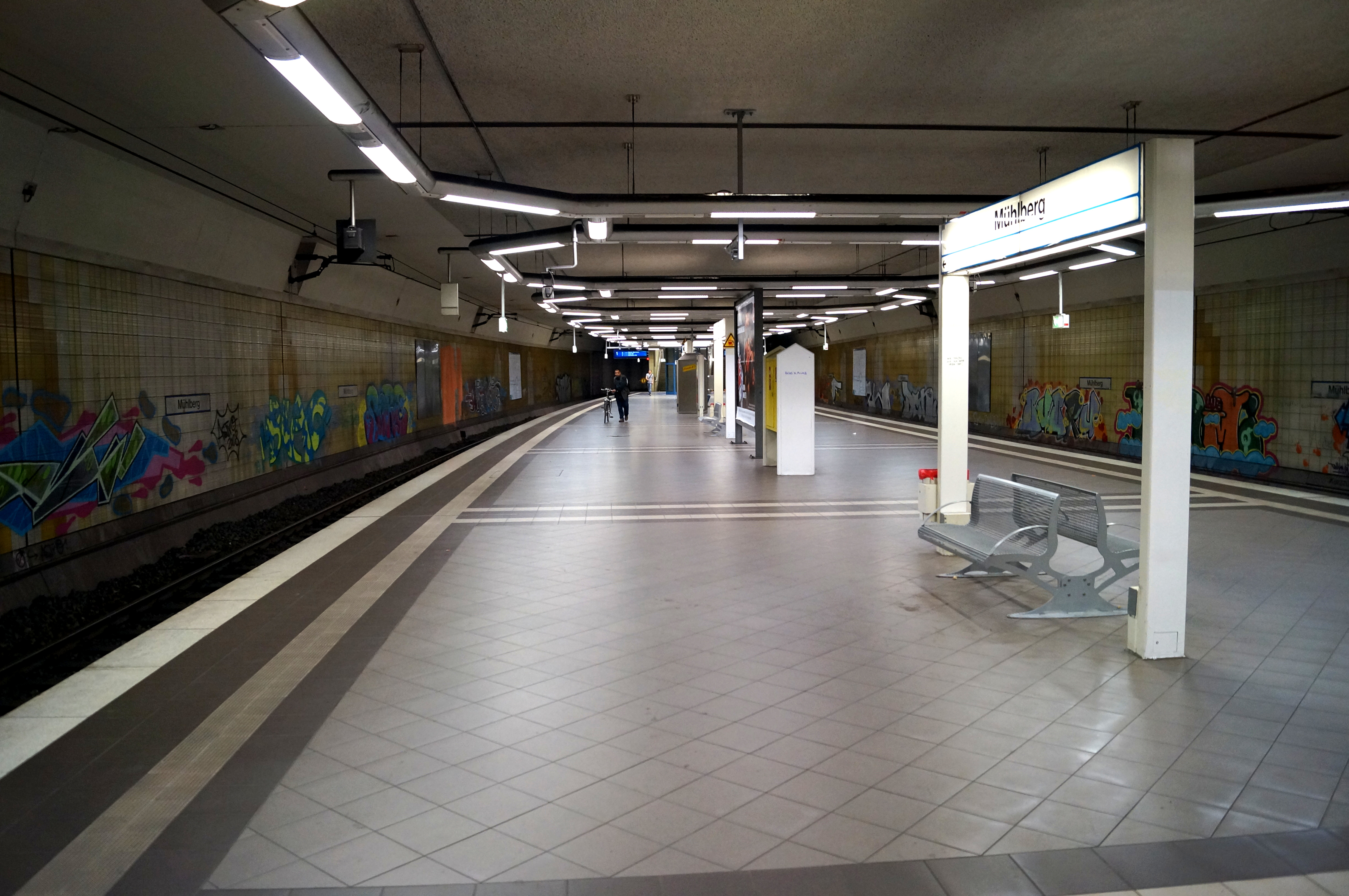 Bahnsteige des Bahnhofs Frankfurt (Main) Mühlberg